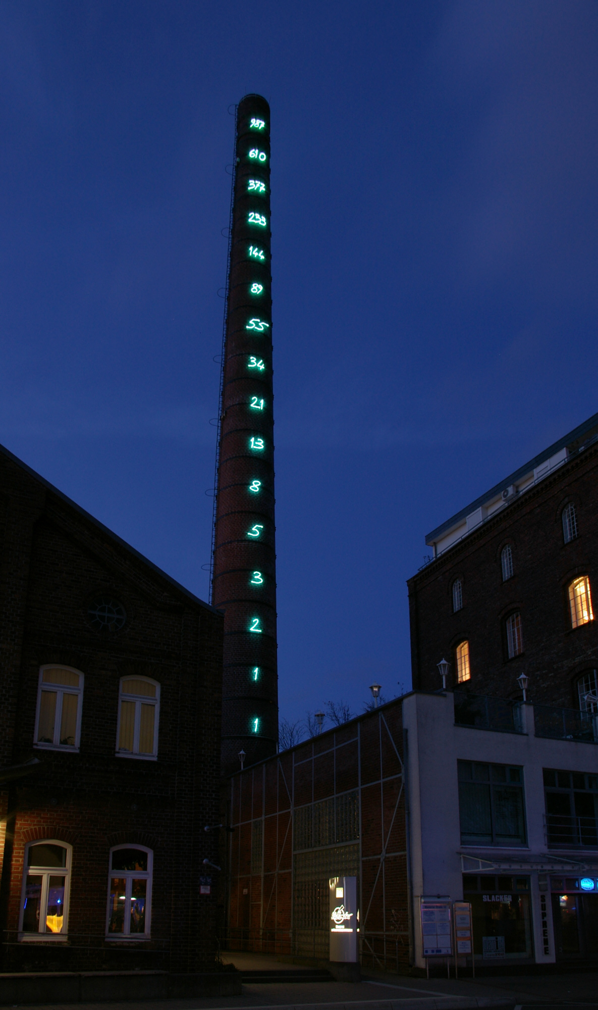 Unna, Kamin der ehemaligen Lindenbrauerei, heute soziokultutrelles Zentrum. Die nachts erleuchteten Fibonacci-Zahlen, ein Lichtkunstwerk von Mario Merz, sind Wahrzeichen des Zentrums für Internationale Lichtkunst. In Deutschland panoramafrei / covered by freedom of panorama.